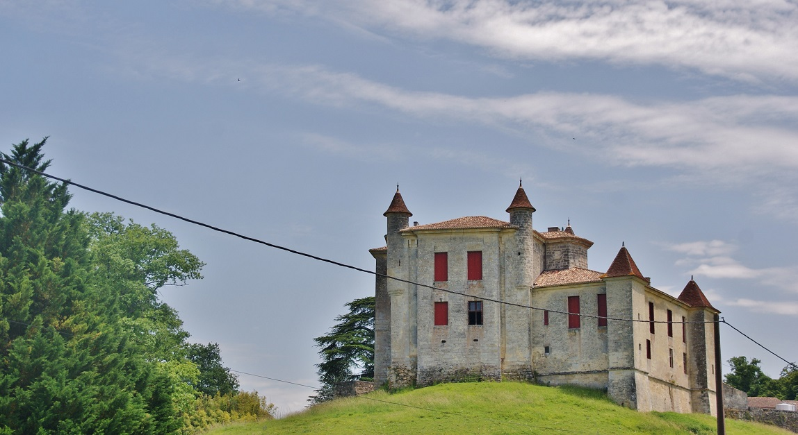 Château de Monbadon